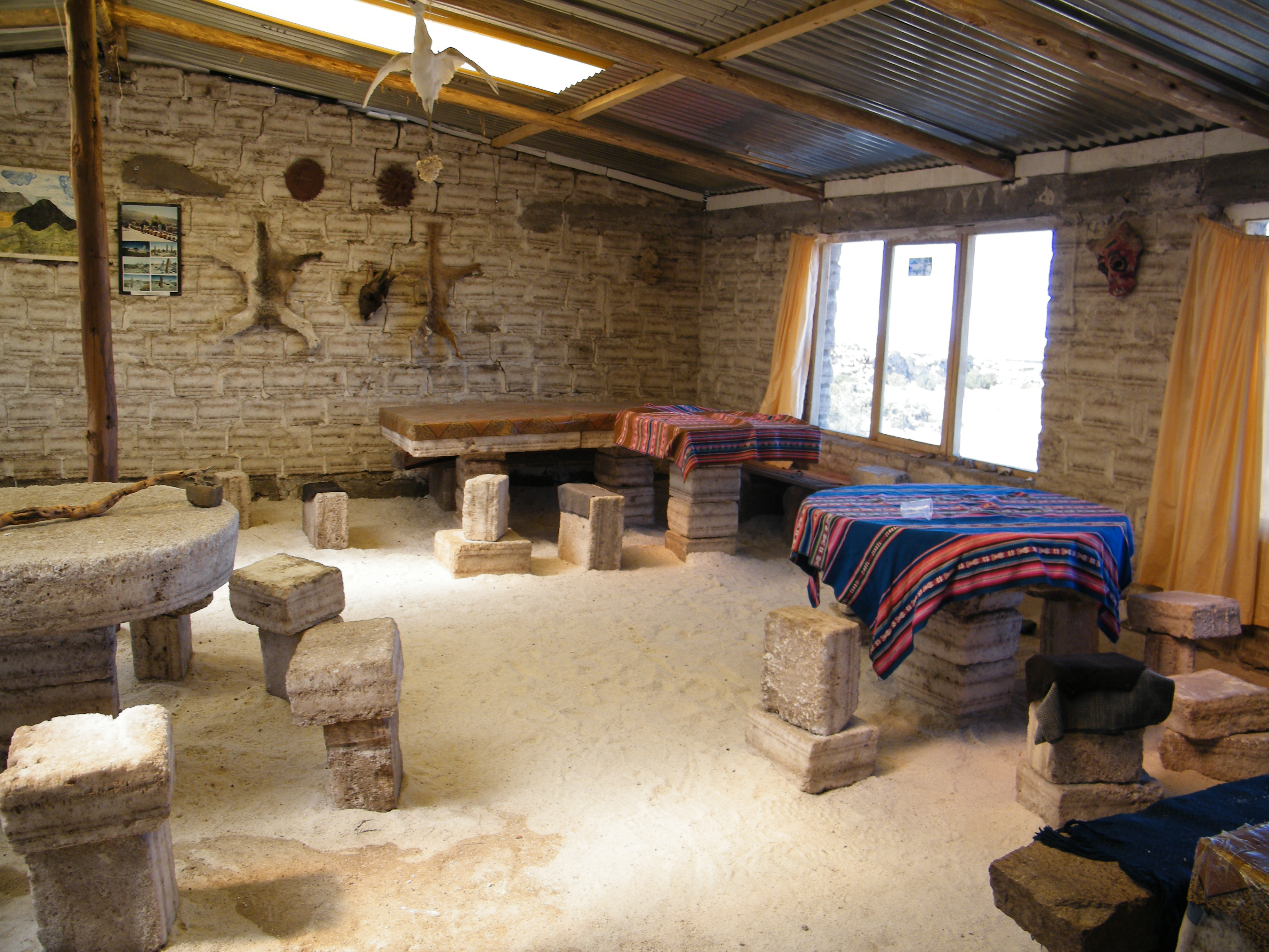 Alojamiento para turistas contruido con bloques de sal extraidos del Salar de Uyuni